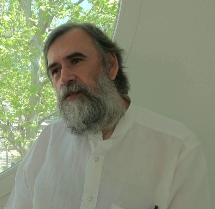 Paco Suarez entrevistado para The Gamer Inside